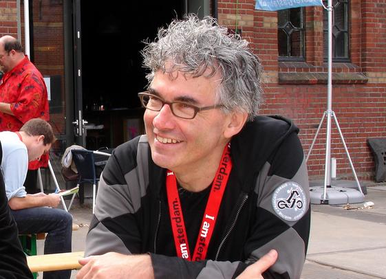 Peter van Ingen, Nederlands televisiepresentator